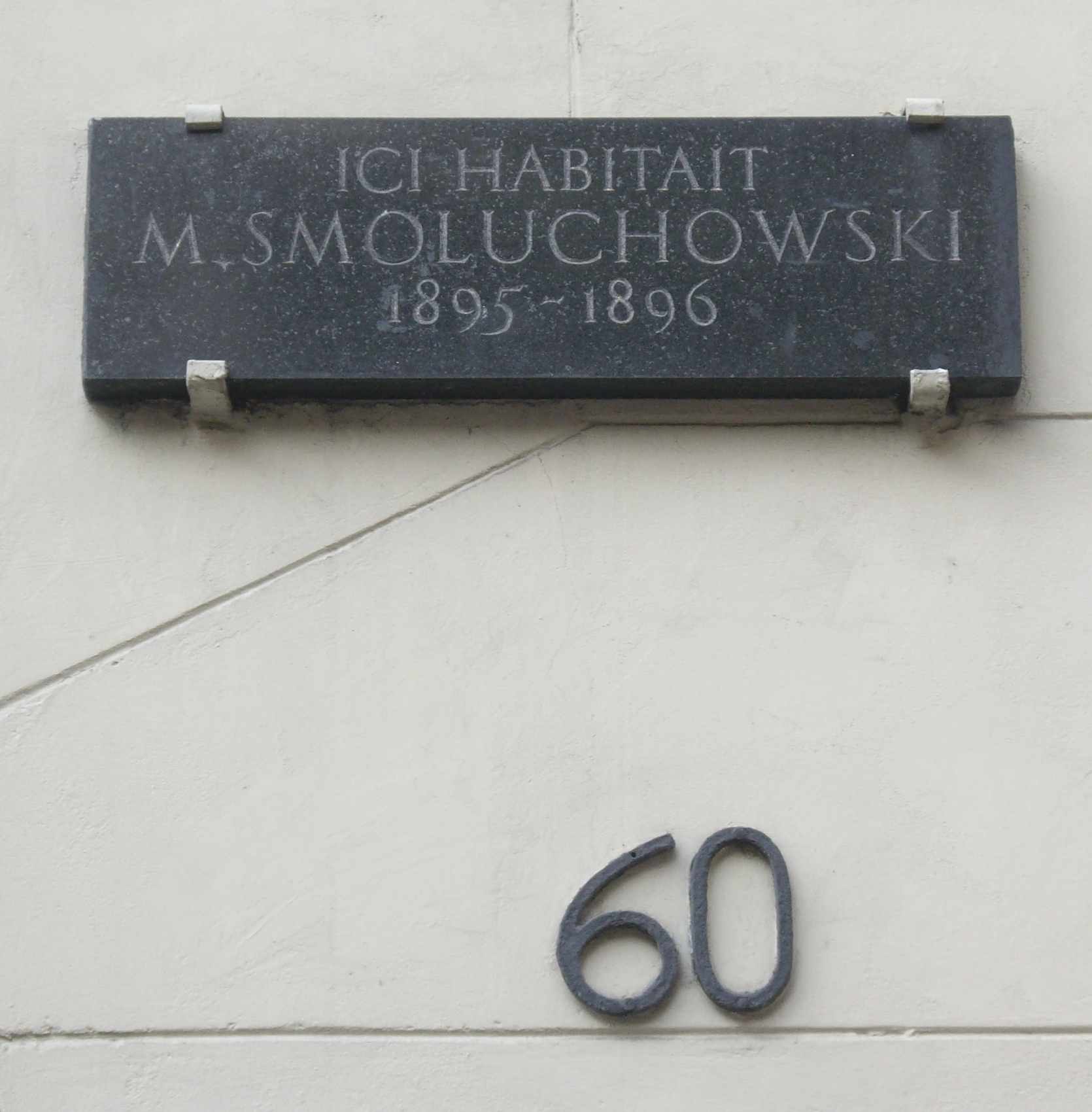 Plaque apposée au n° 60 de la rue d'Assas, Paris 6e, alors hôtel Orfila, où habita le physicien Marian Smoluchowski (1872-1917) de 1895 à 1896.